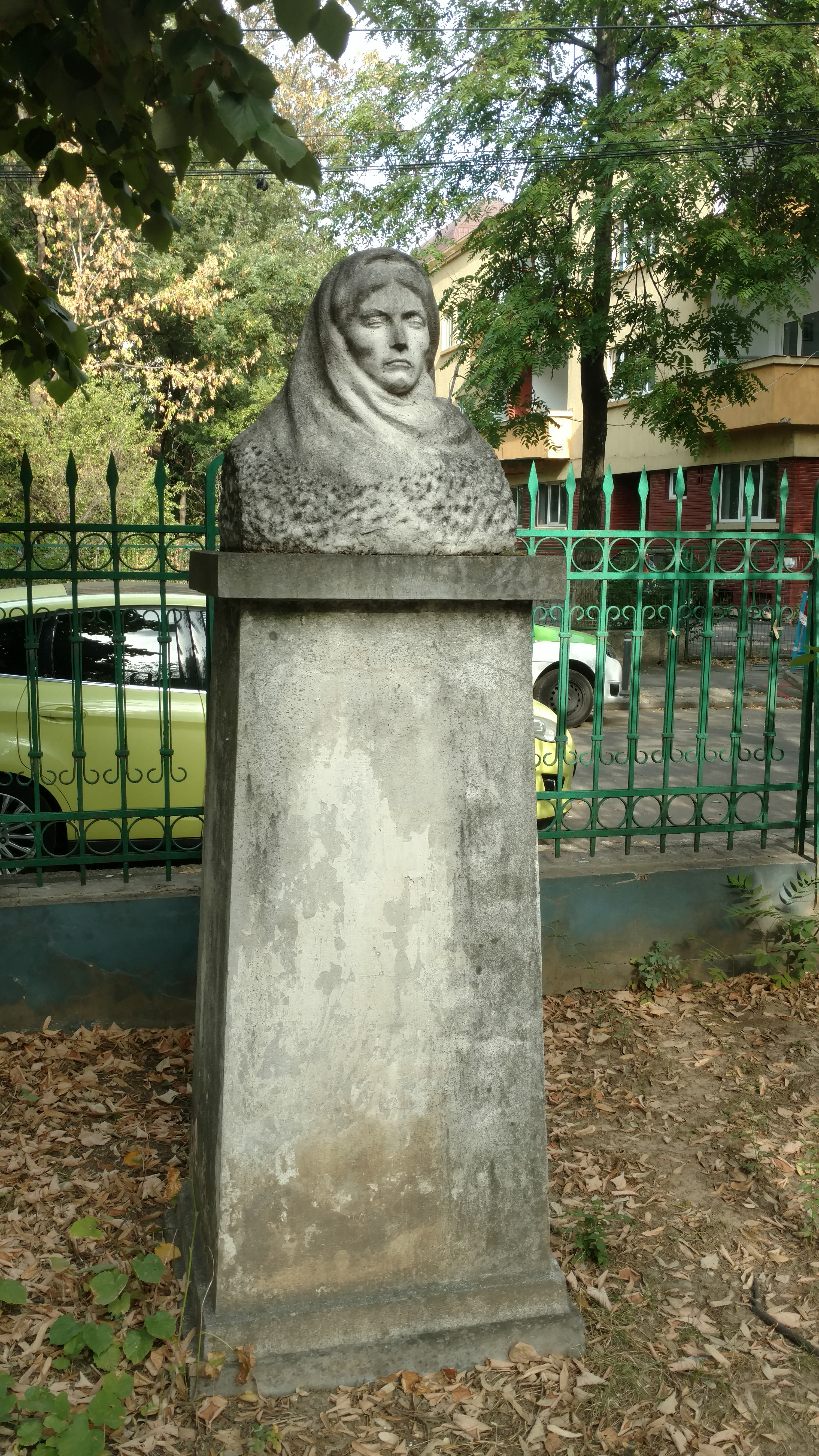 Bustul Emiliei Irza Din incinta Institutului national pentru Sanatatea Mamei si Copilului "Alessandrescu-Rusescu"